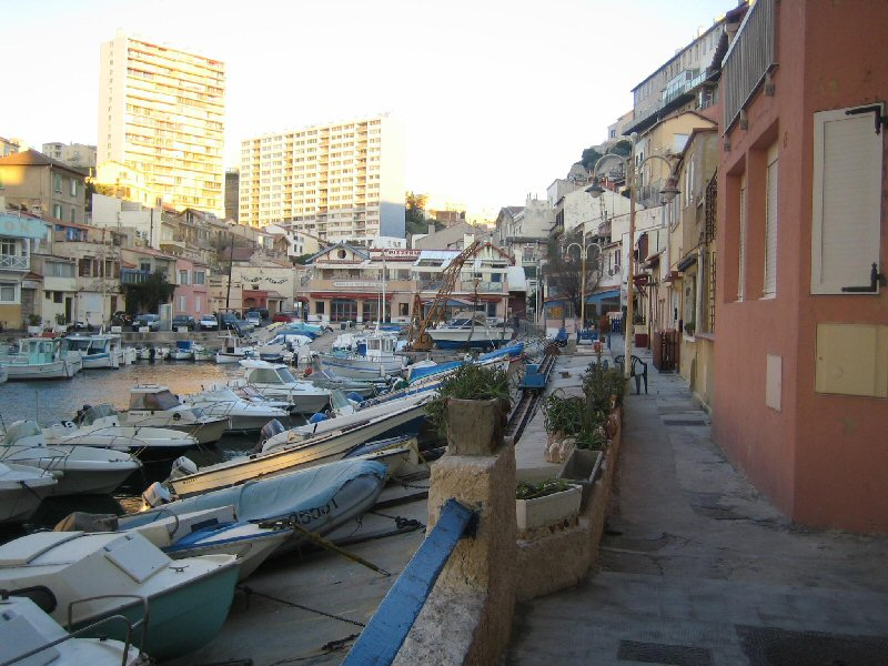 Le Vallon des Auffes, Marseille, France.